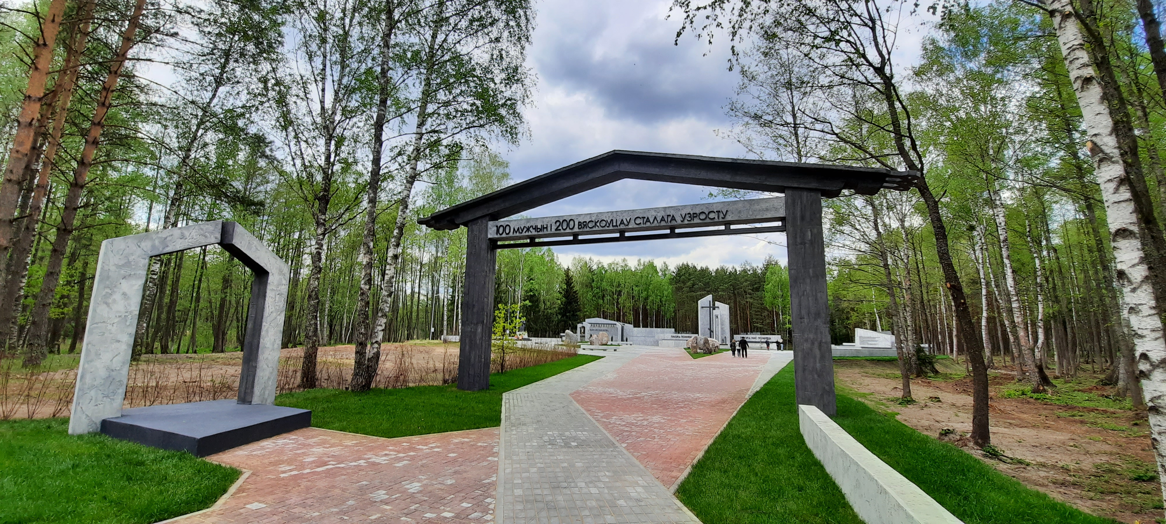 Мемарыяльны комплекс Ала ў мае 2020